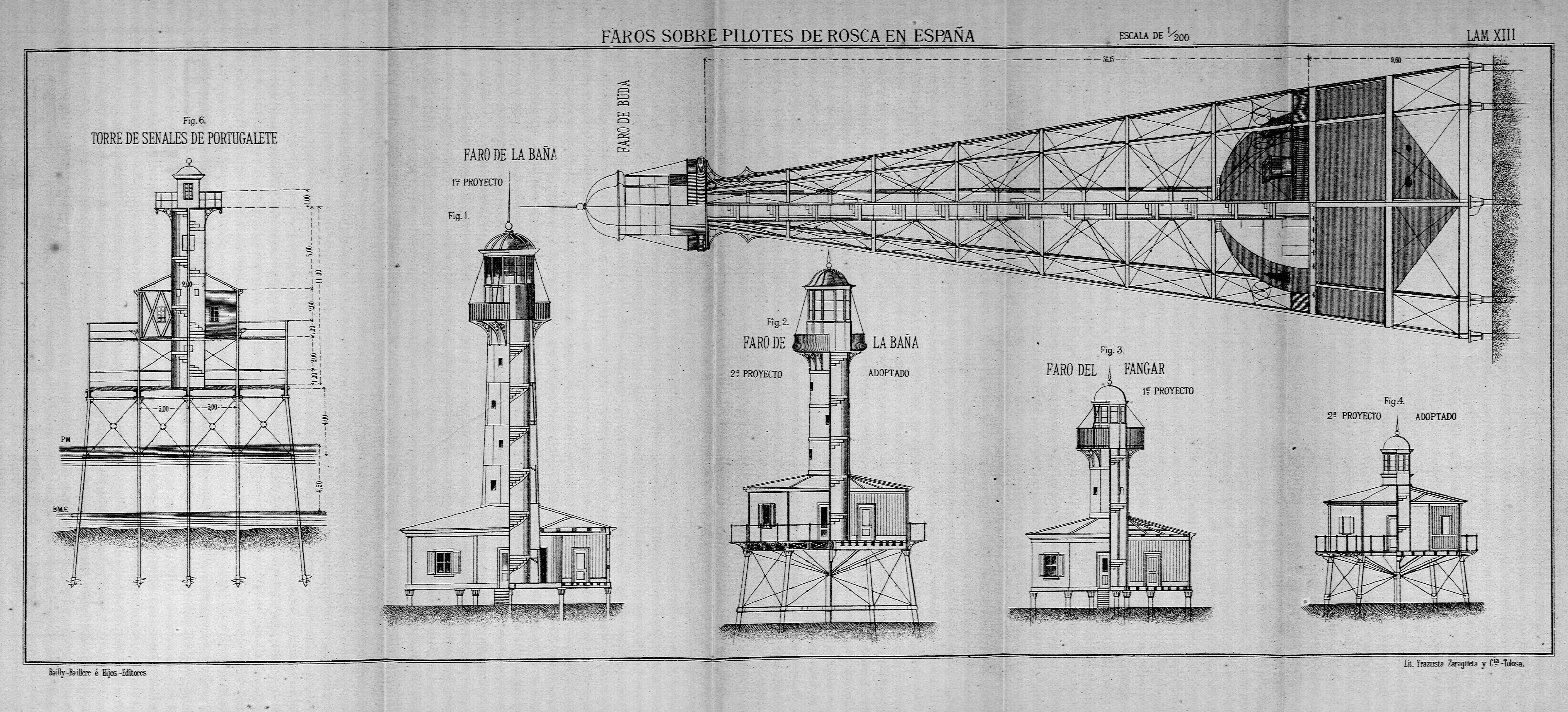 Lamina del libro Puentes de hierro económicos, muelles y faros sobre palizadas y pilotes mecánicos. Madrid: Librería Editorial de Bailly-Bailliere e Hijos.